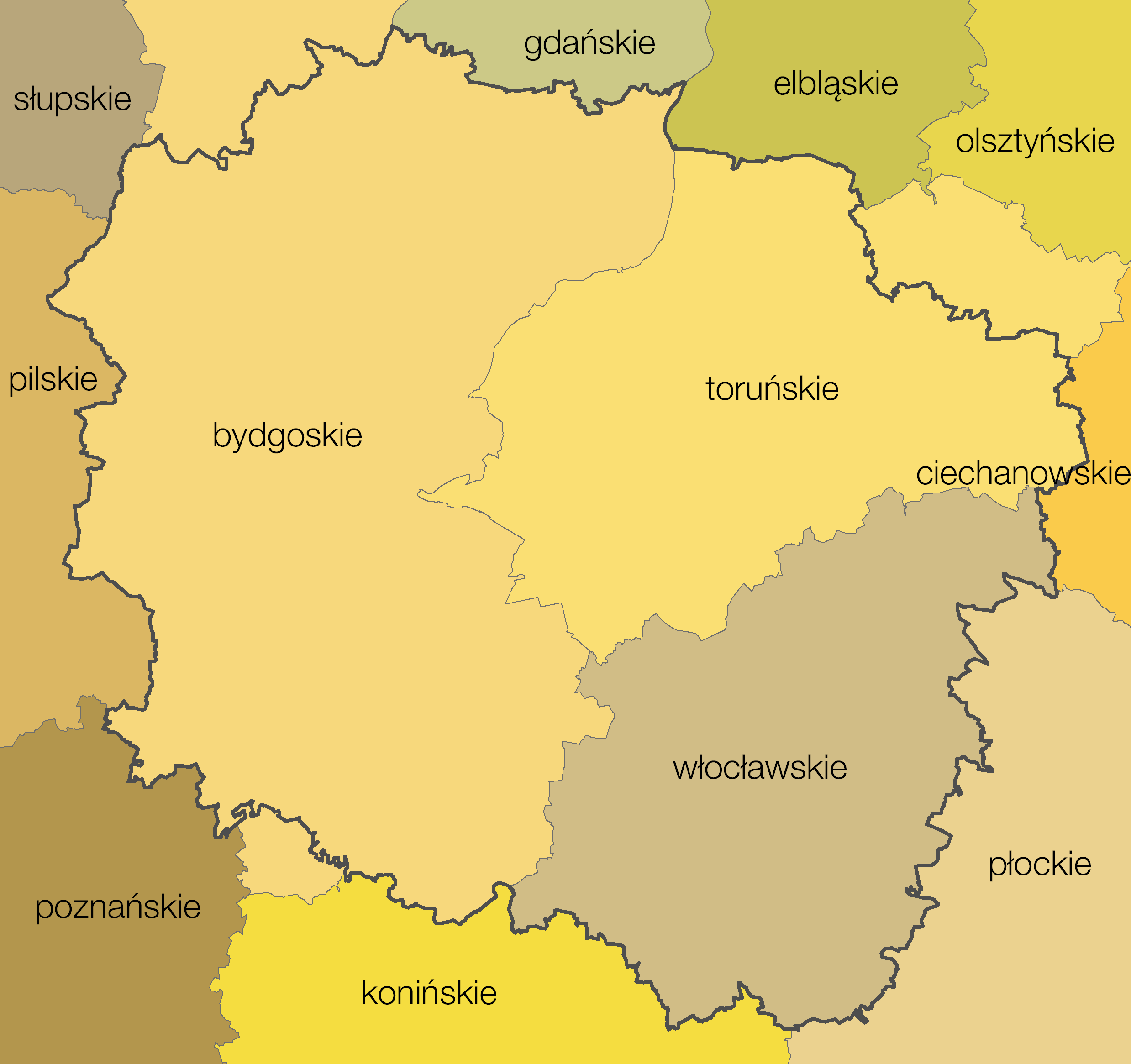 Województwo kujawsko-pomorskie (od 1999) jako powstałe z województw podziału administracyjnego Polski z lat 1975-1998